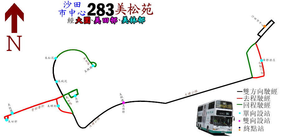 中文（香港）: 九巴283線的走線圖，惟暫時沒有巴士相